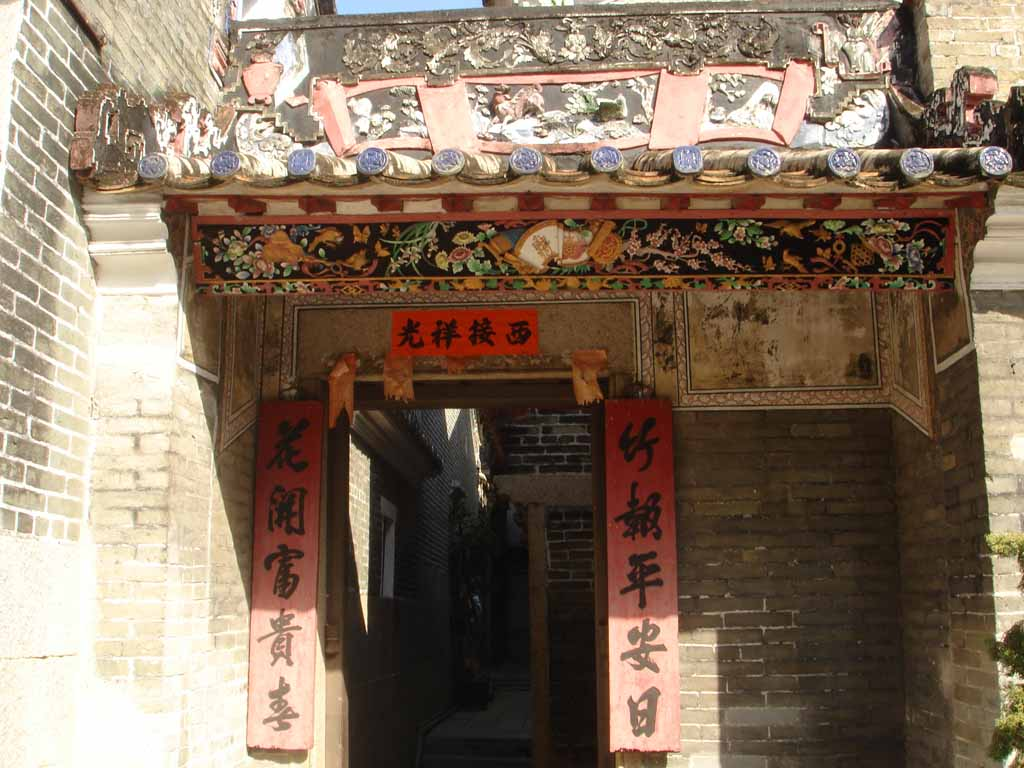 中文（香港）: 清暑軒正門。